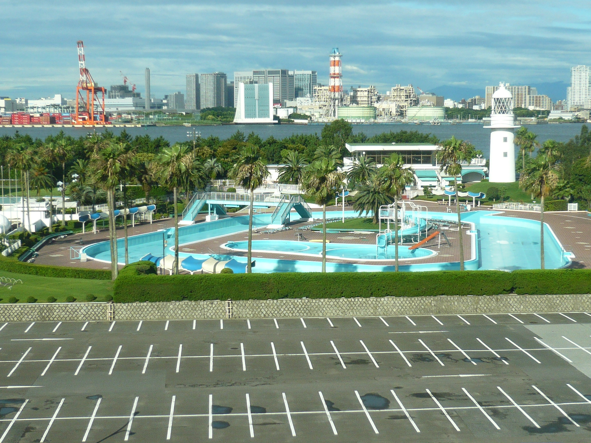 東京都品川区東八潮にある船の科学館シーサイドプール Funenokagakukan Seaside Pool(船の科学館シーサイドプール) in Shinagawa-ku,Tokyo,Japan.